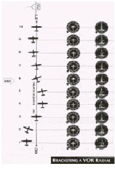 VOR con DME